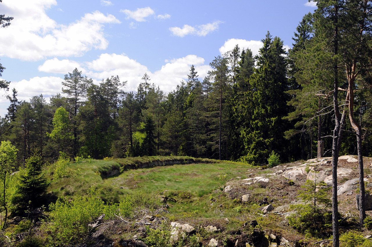 «Nedre» del av batteriet. Foto: Tommy Gildseth.